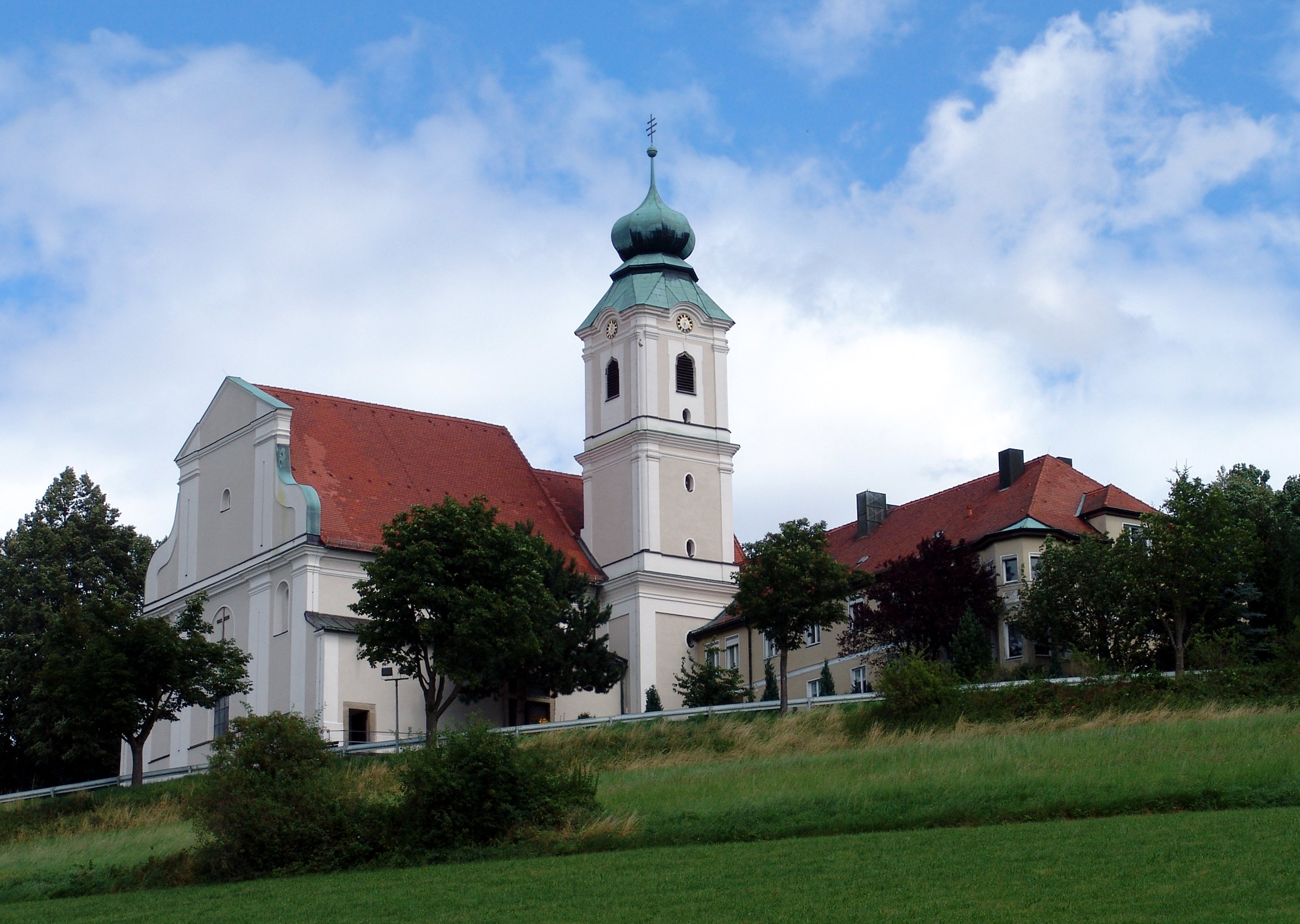 Wallfahrtskirche St. Felix, erbaut 1735 - 1749